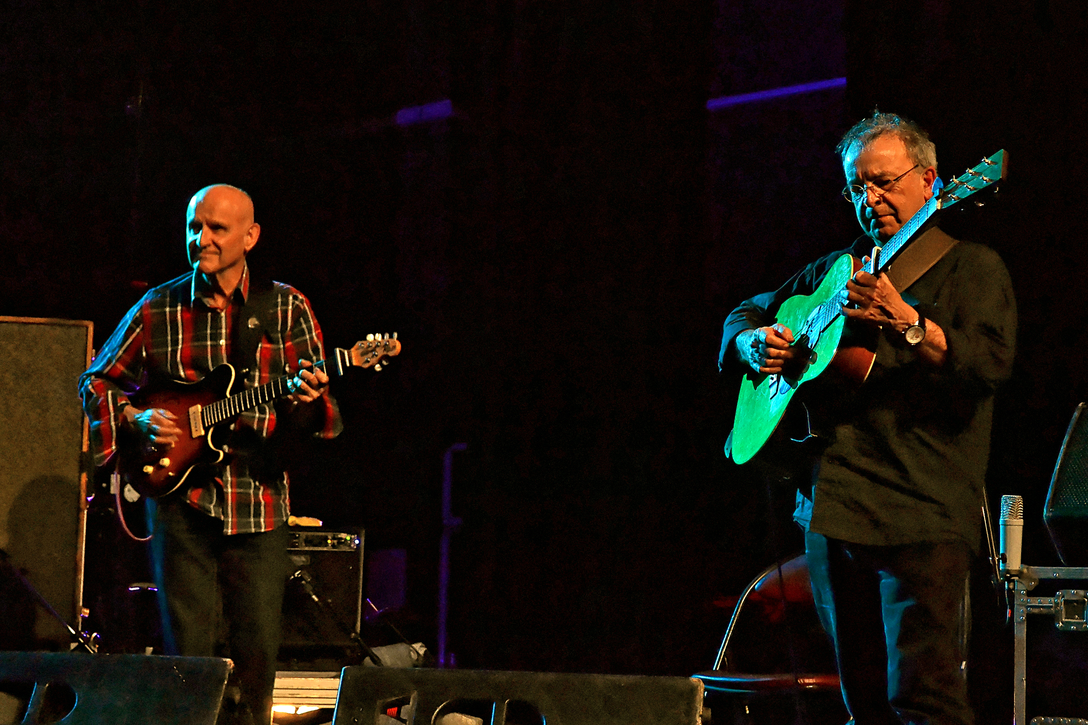 Concert de Breizharock avec la participation exceptionnelle de Dan Ar Braz salle de Tronjoly à Gourin au profit de la lutte contre la muco, organisé par la Pierre Le Bigaut.